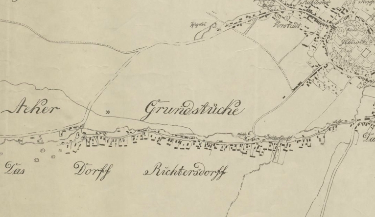 Richtersdorf bei Gleiwitz im Jahr 1812. Zeichnung von 1911 nach alten Karten.